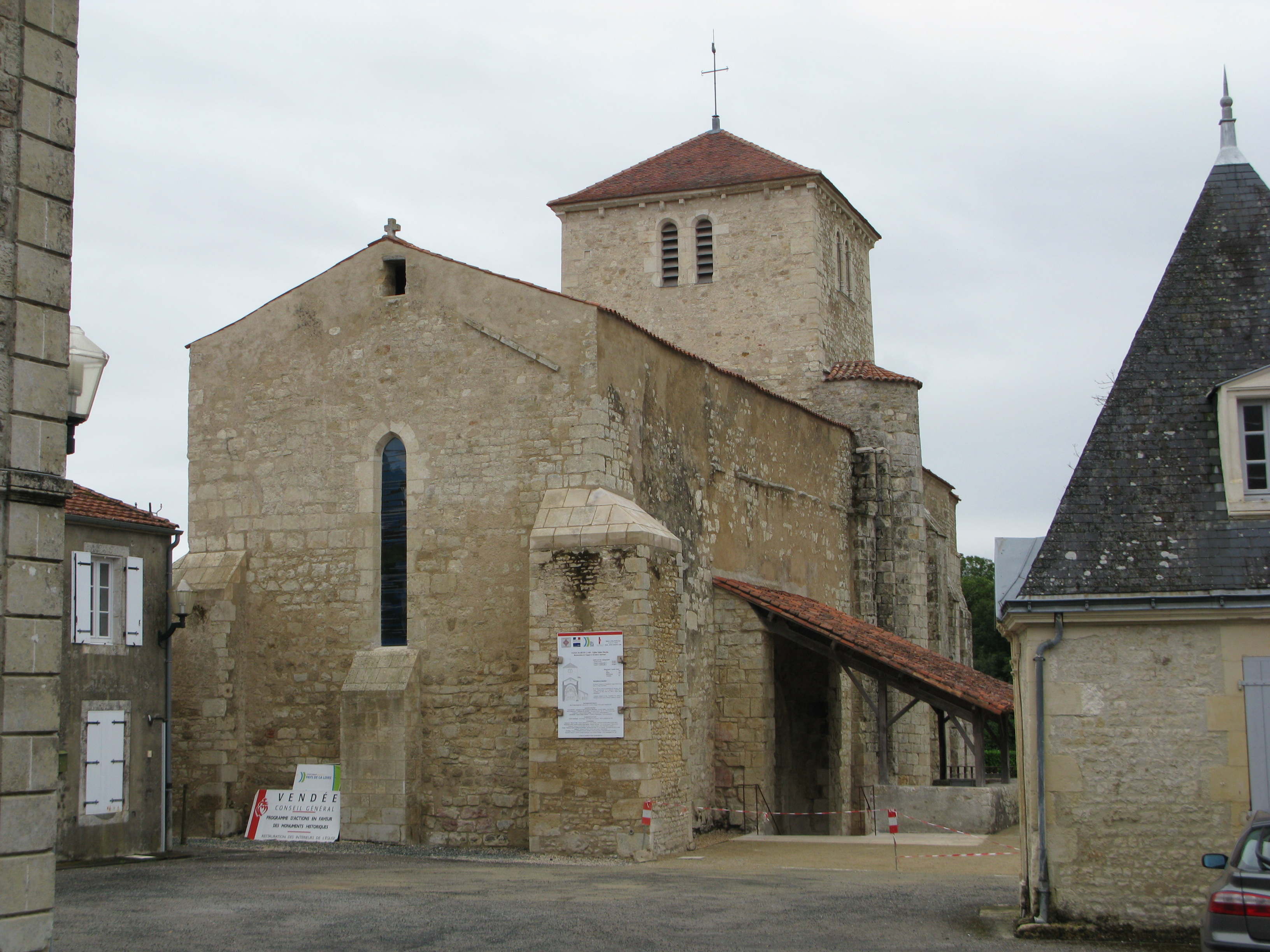 L'église de Saint-Martin-Lars-en-Sainte-Hermine